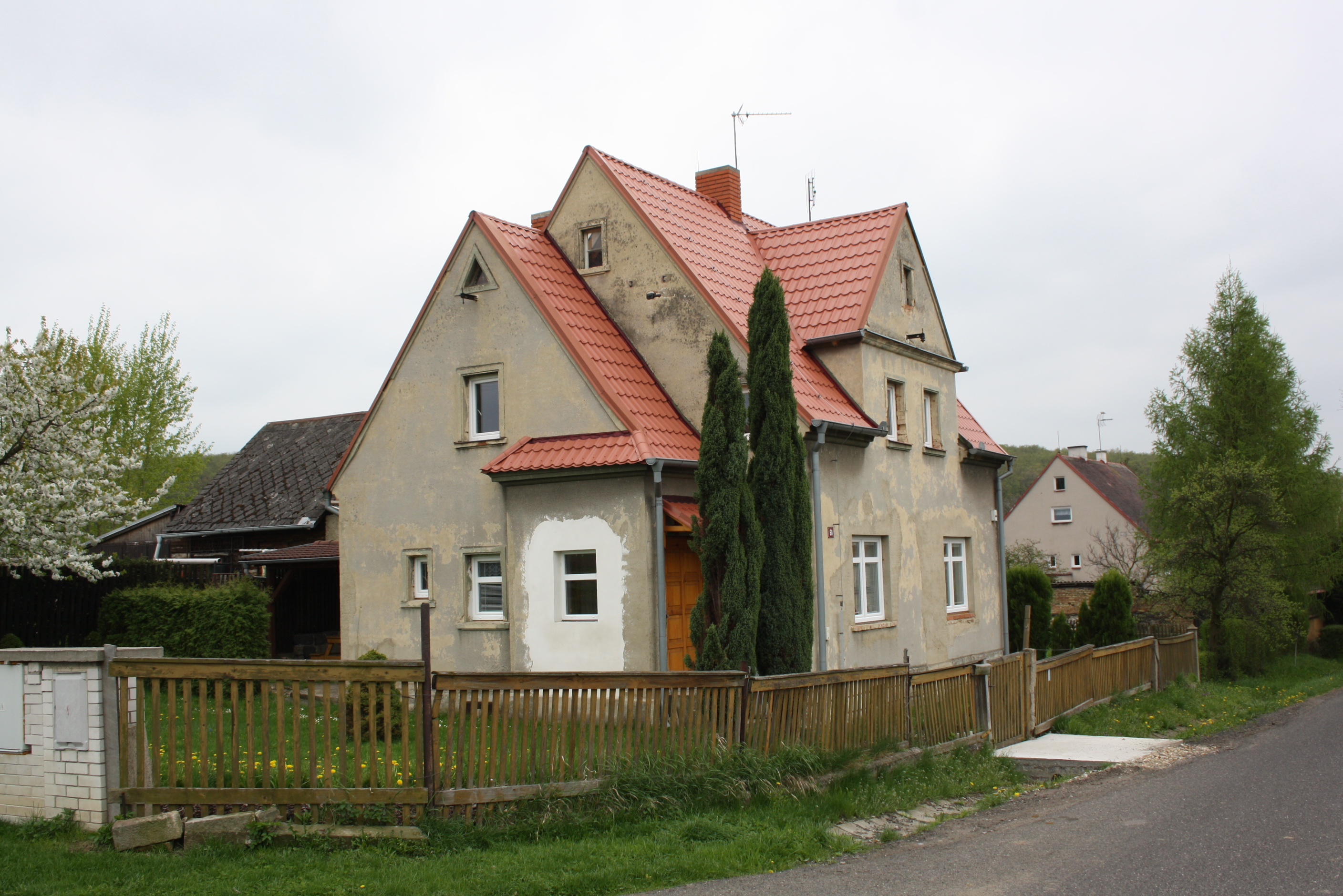 Dům číslo popisné 60 v Horních Řepčicích.